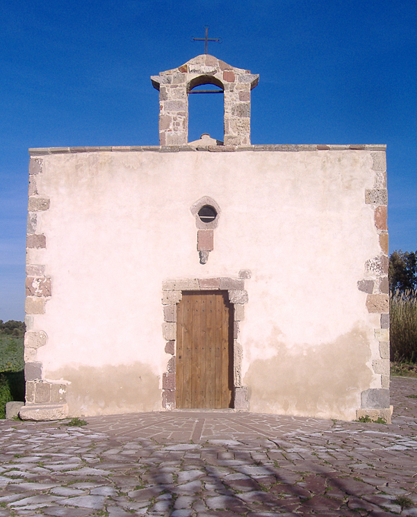 Chiesa di Santa Marta, Villarios